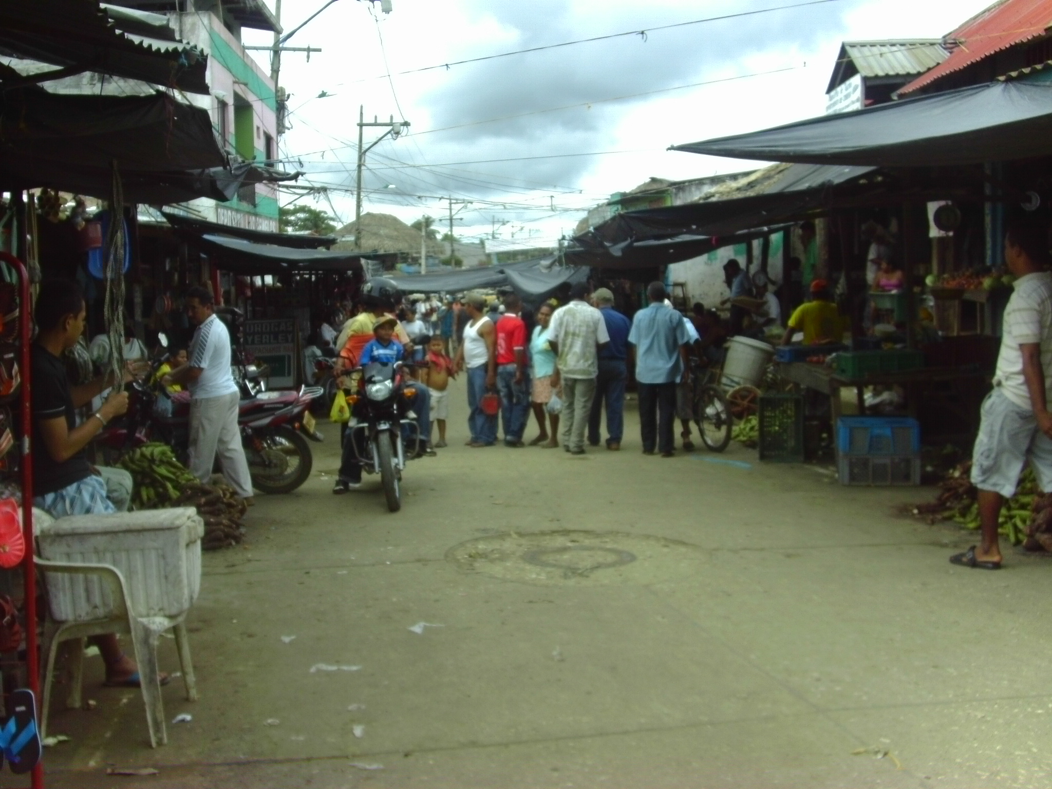 Plaza de mercado de Tuchín